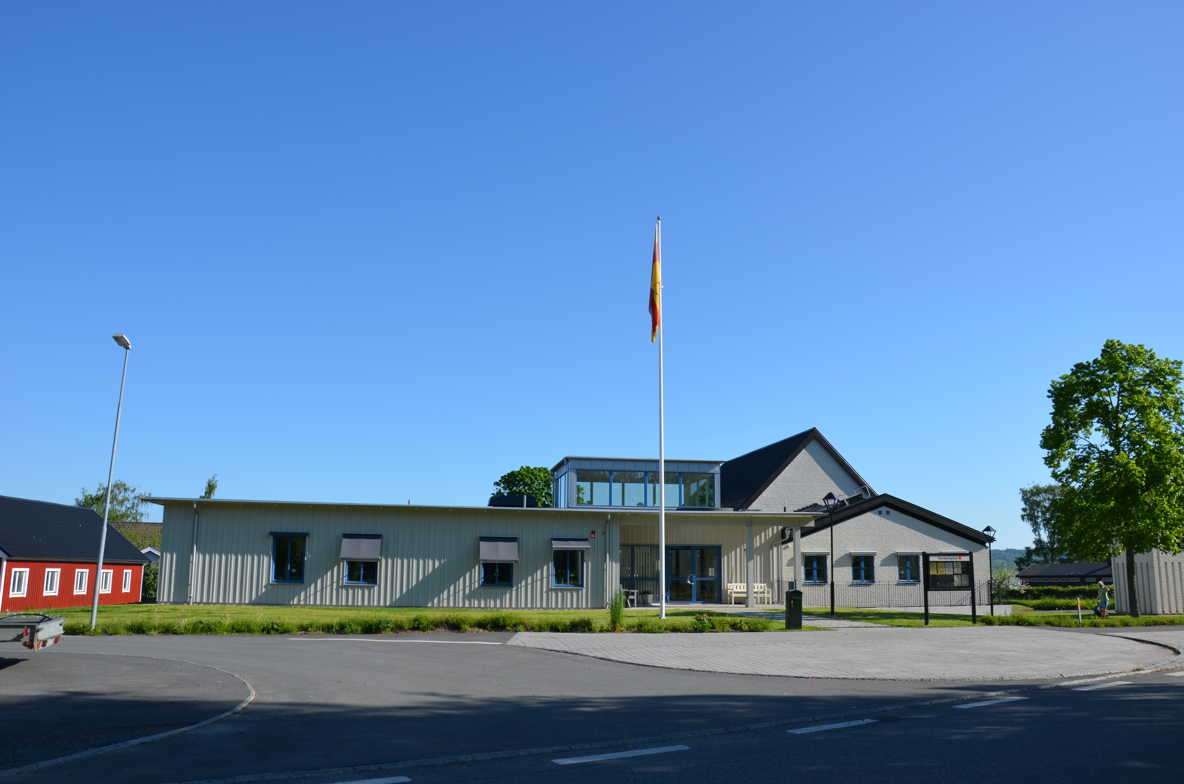 Landsjökyrkan i Kaxholmen